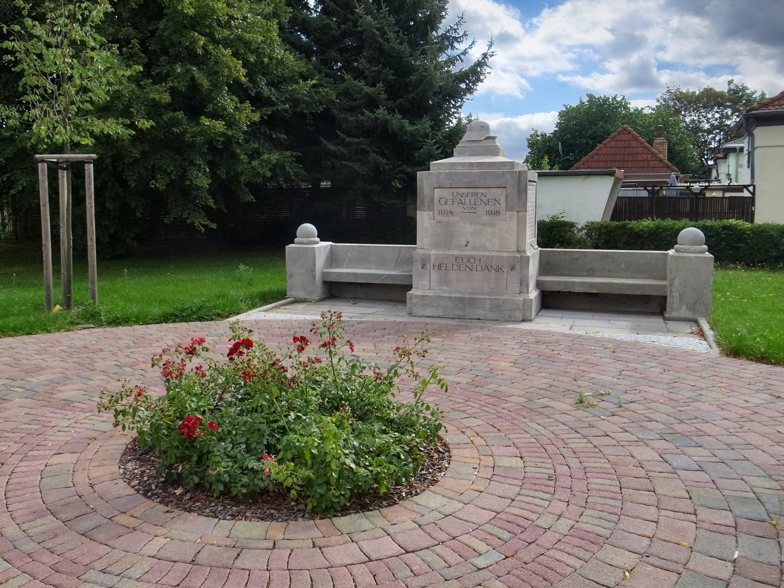 Sandersdorf Ortsteil Zscherndorf Gefallenendenkmal 1914-18